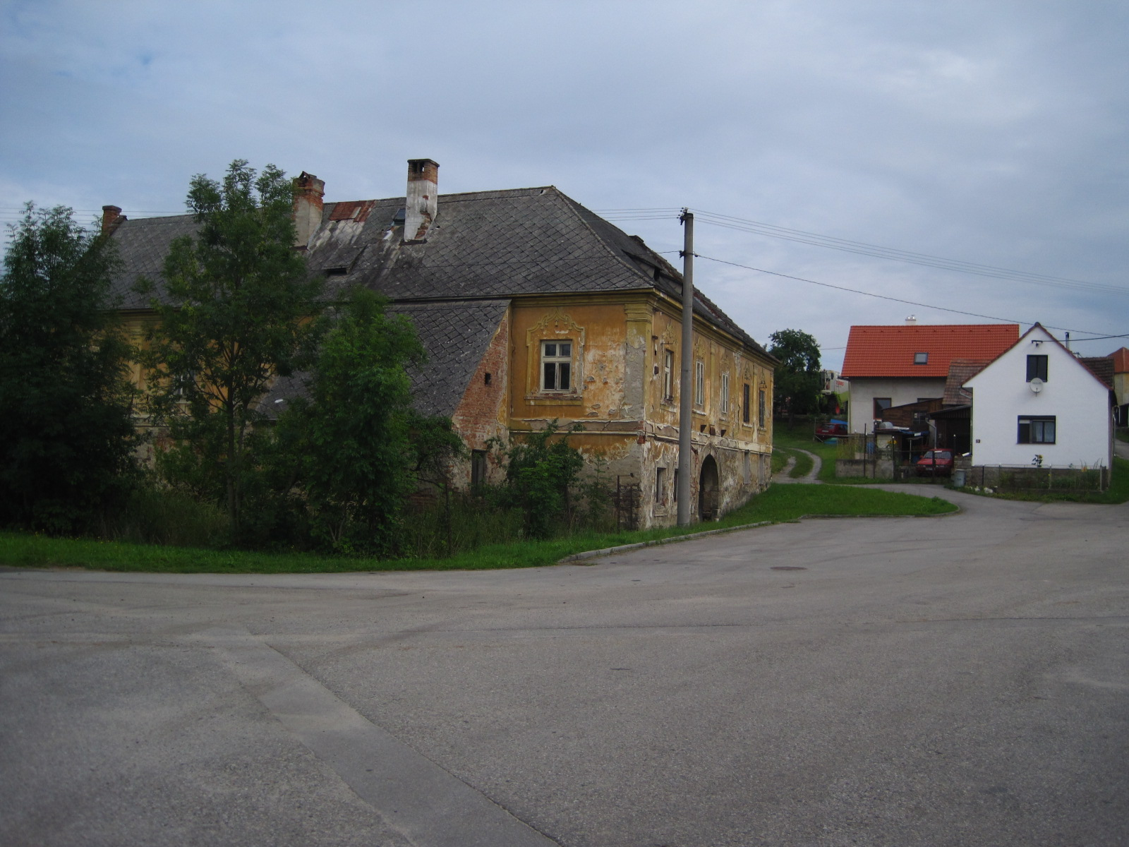 Usedlost U Filků, Přísečná 1, náves, Přísečná.